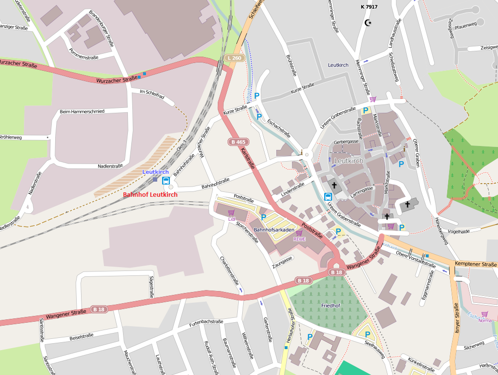 Umgebungskarte des Bahnhofes Leutkirch This map may be incomplete, and may contain errors. Don't rely solely on it for navigation.